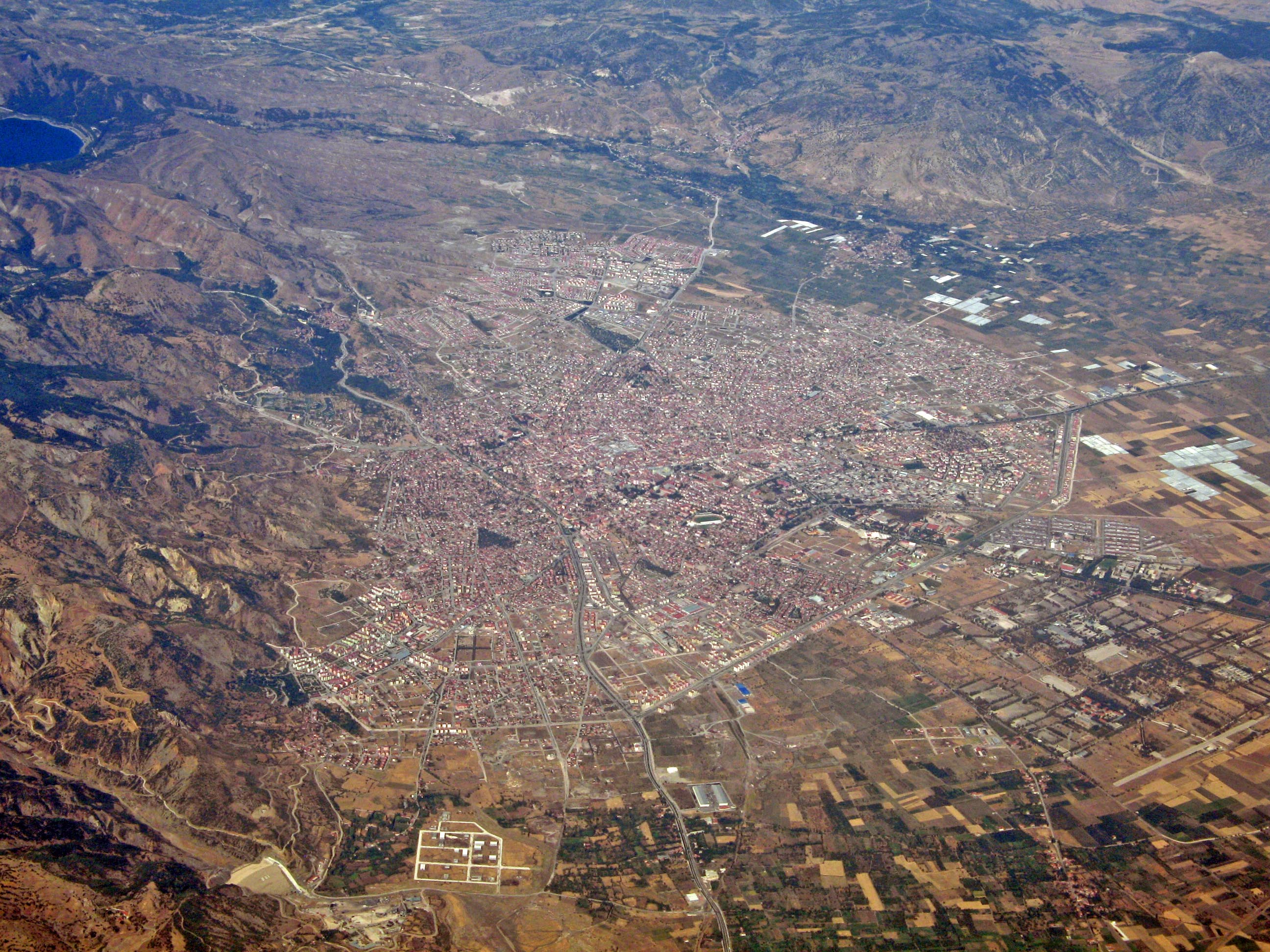 Luftbildaufnahme von Isparta aus etwa 10.000 m Höhe